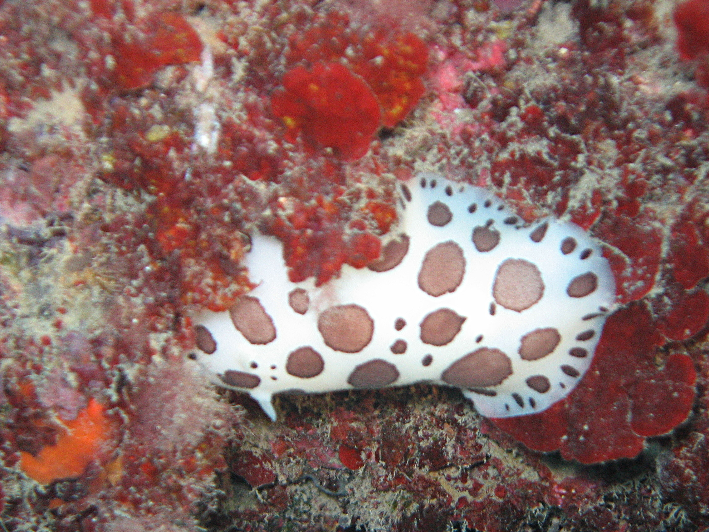 Peltodoris atromaculata (La Vesse FR - 13)